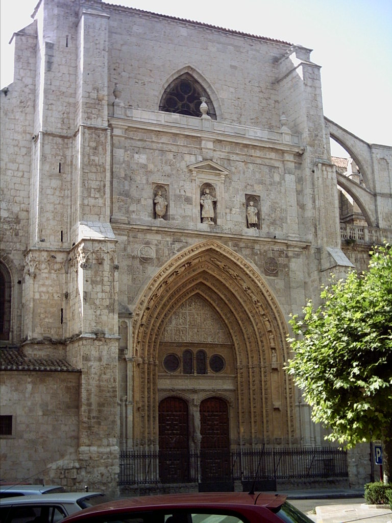 La Puerta de San Juan en la Catedral de Palencia.